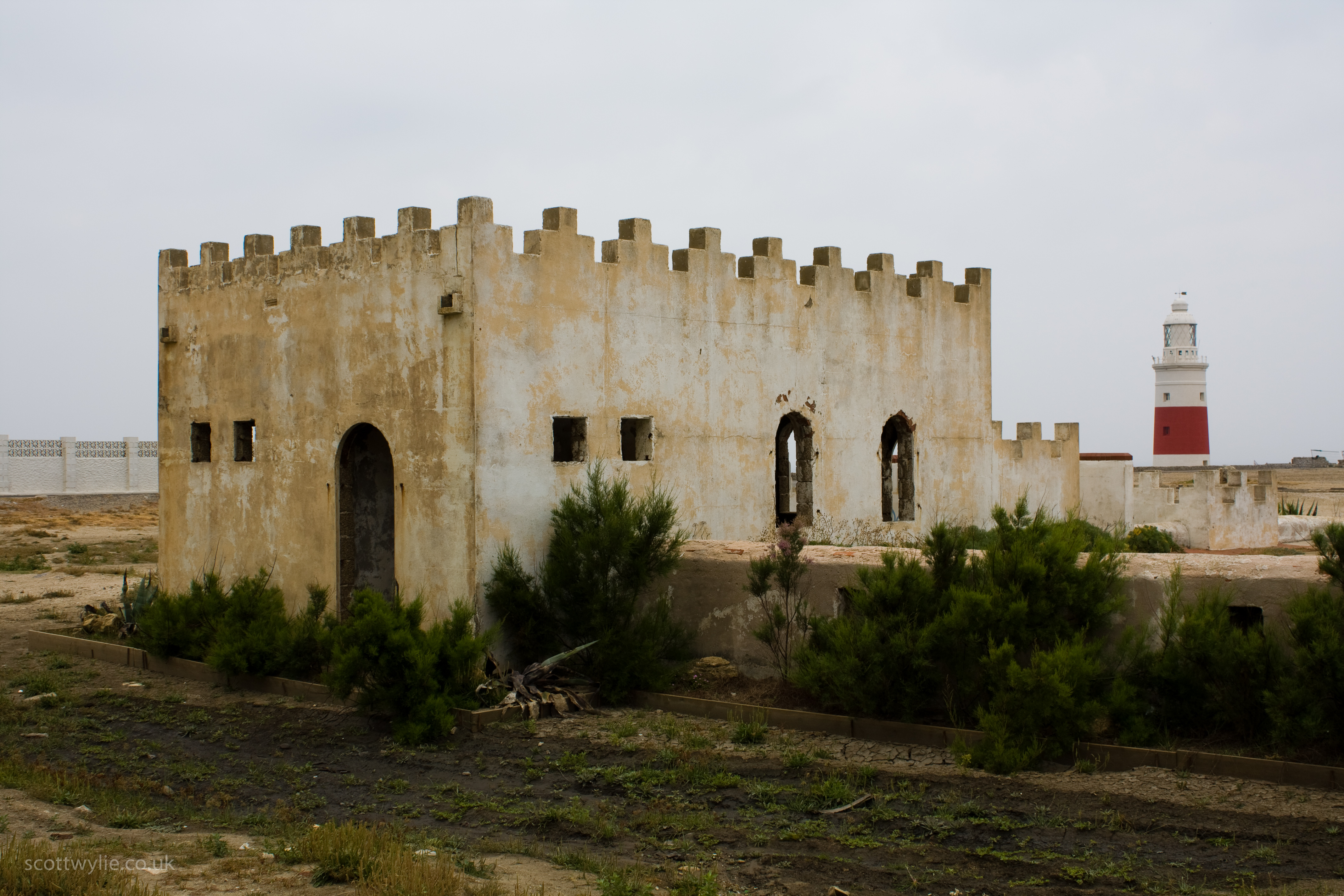 Nun's Well, Europa Point, Gibraltar.